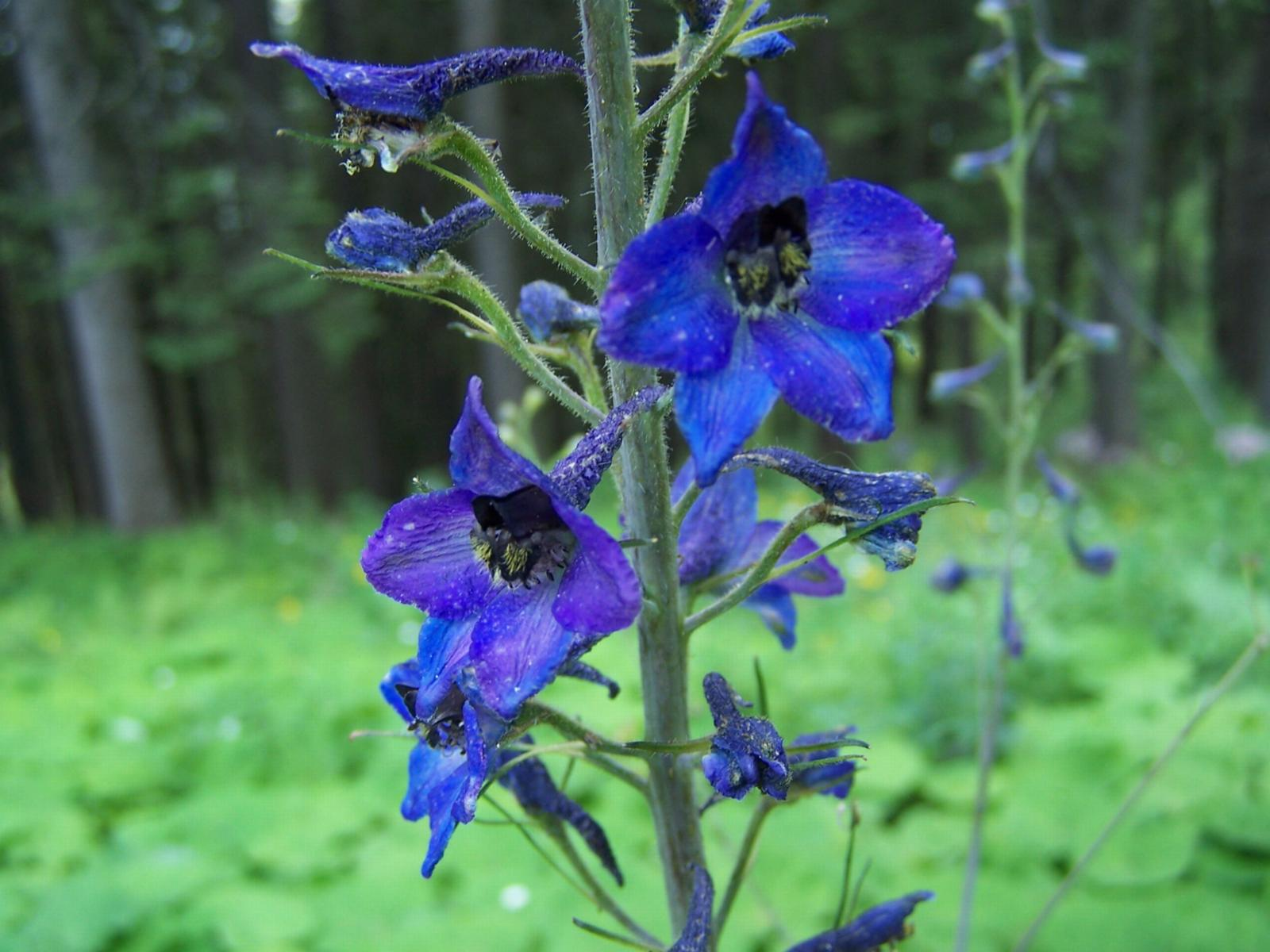 Delphinium elatum (pl. ostróżka wyniosła), habitat: Tatra Mountains, Dolina Strążyska